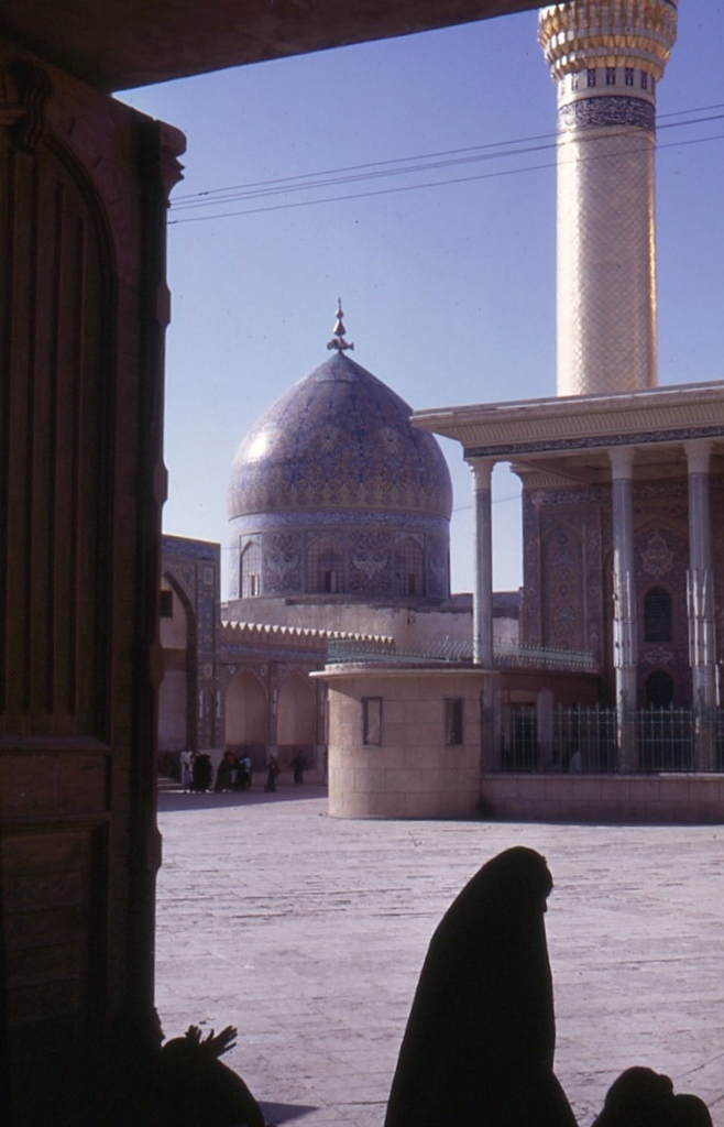 Samarra, entrée du sanctuaire en 1970